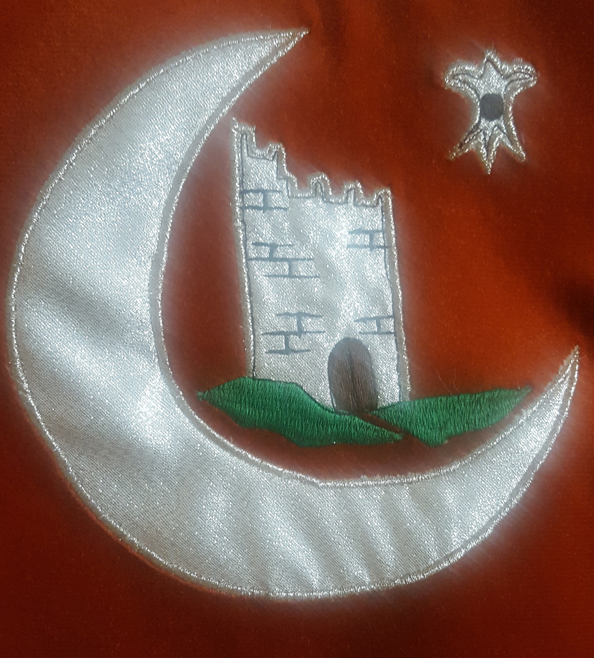 Escudo de las Huestes del Cadí bordado en la trasera del chaleco del uniforme oficial de la comparsa.